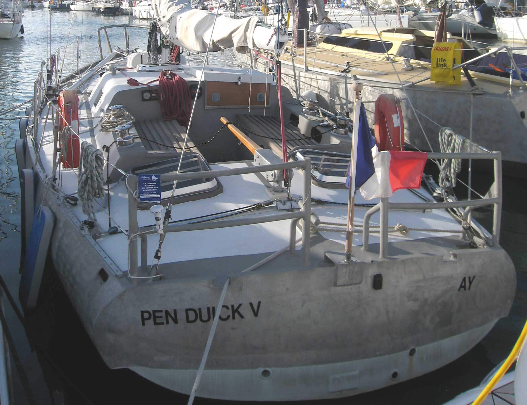 Description : Pen Duick 5 Place : Port Haliguen, Bretagne, France Date : 2006 Auteur : Pline